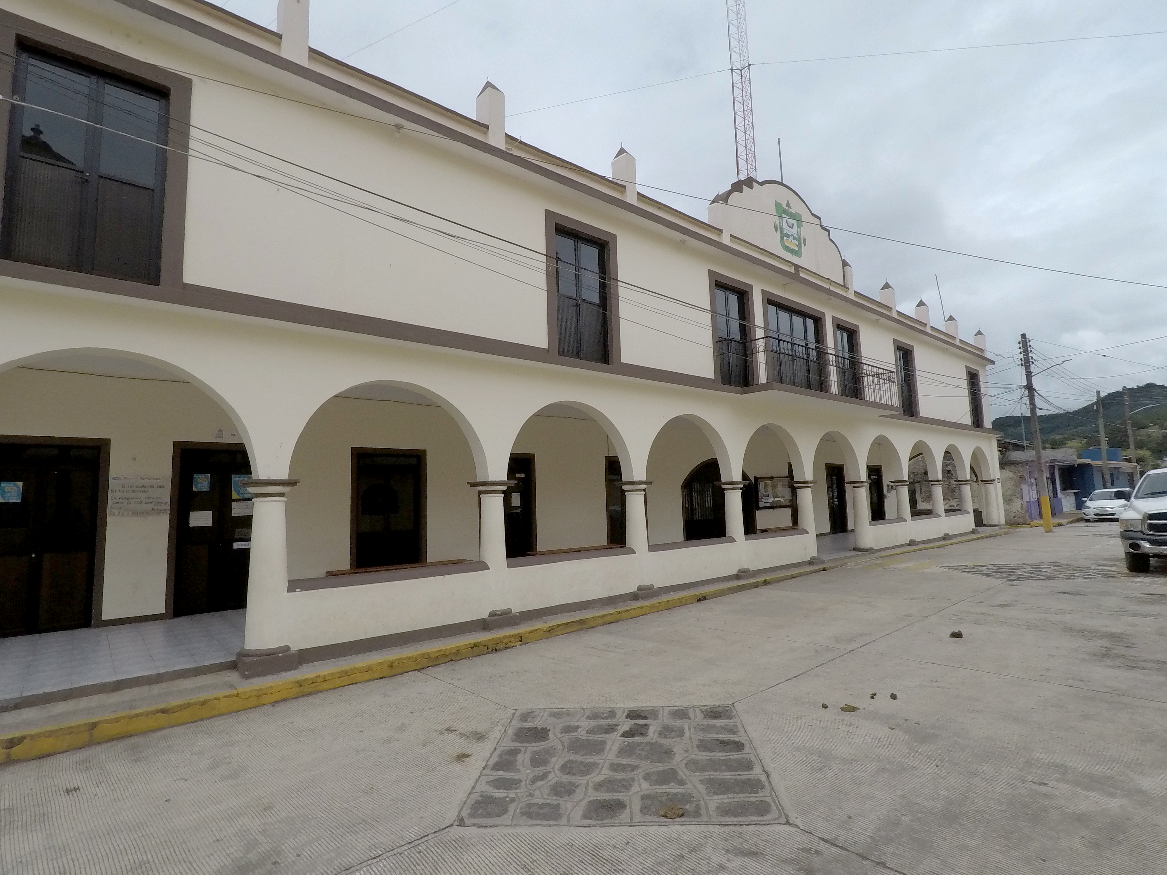 Palacio municipal acajete